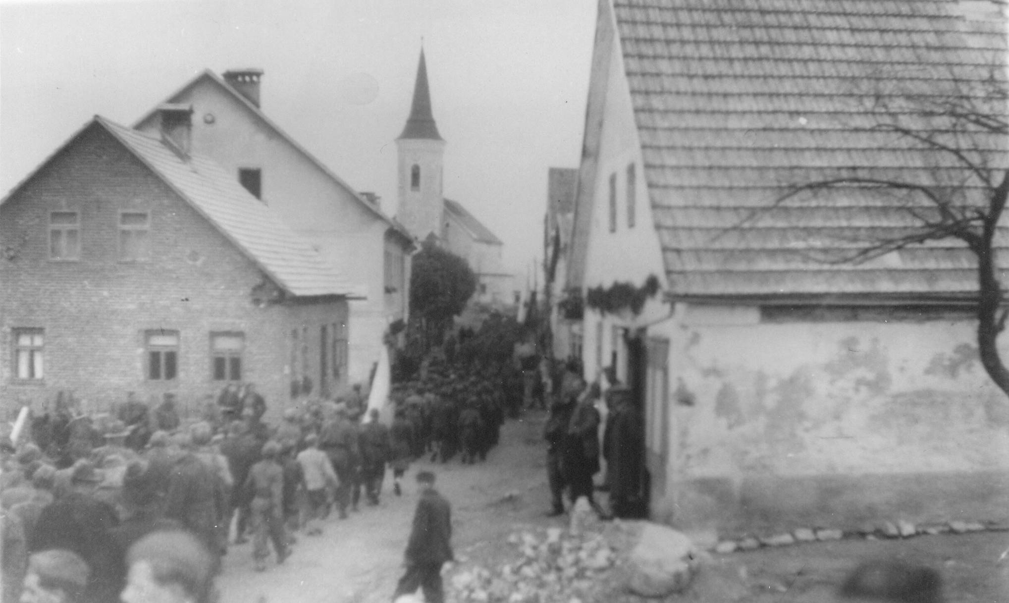 Proslava 1. maja na Starem trgu ob Kolpi